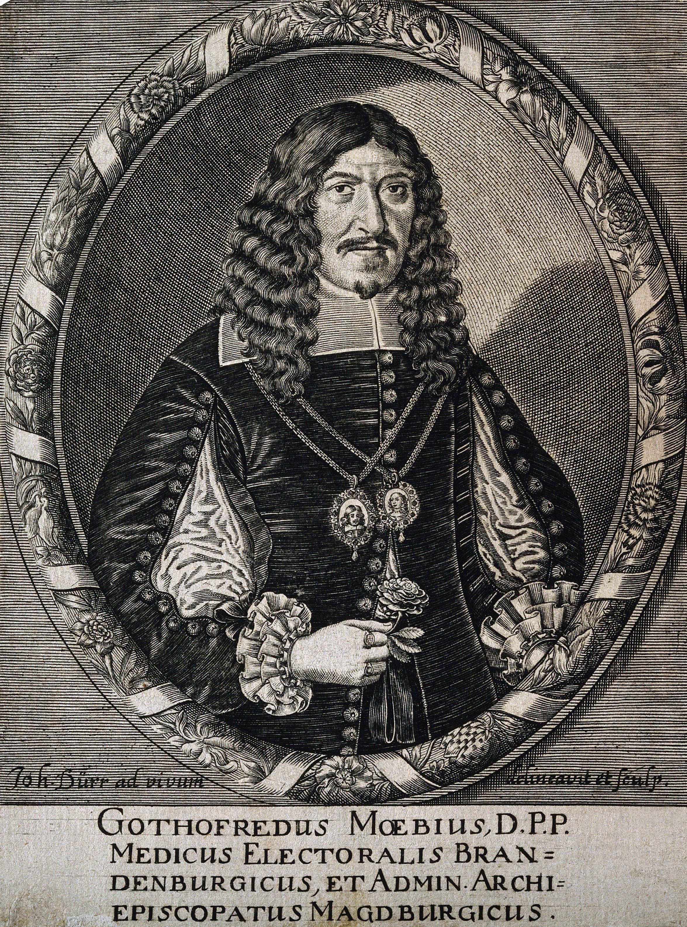 Gottfried Moebius (1611-1664) deutscher Mediziner